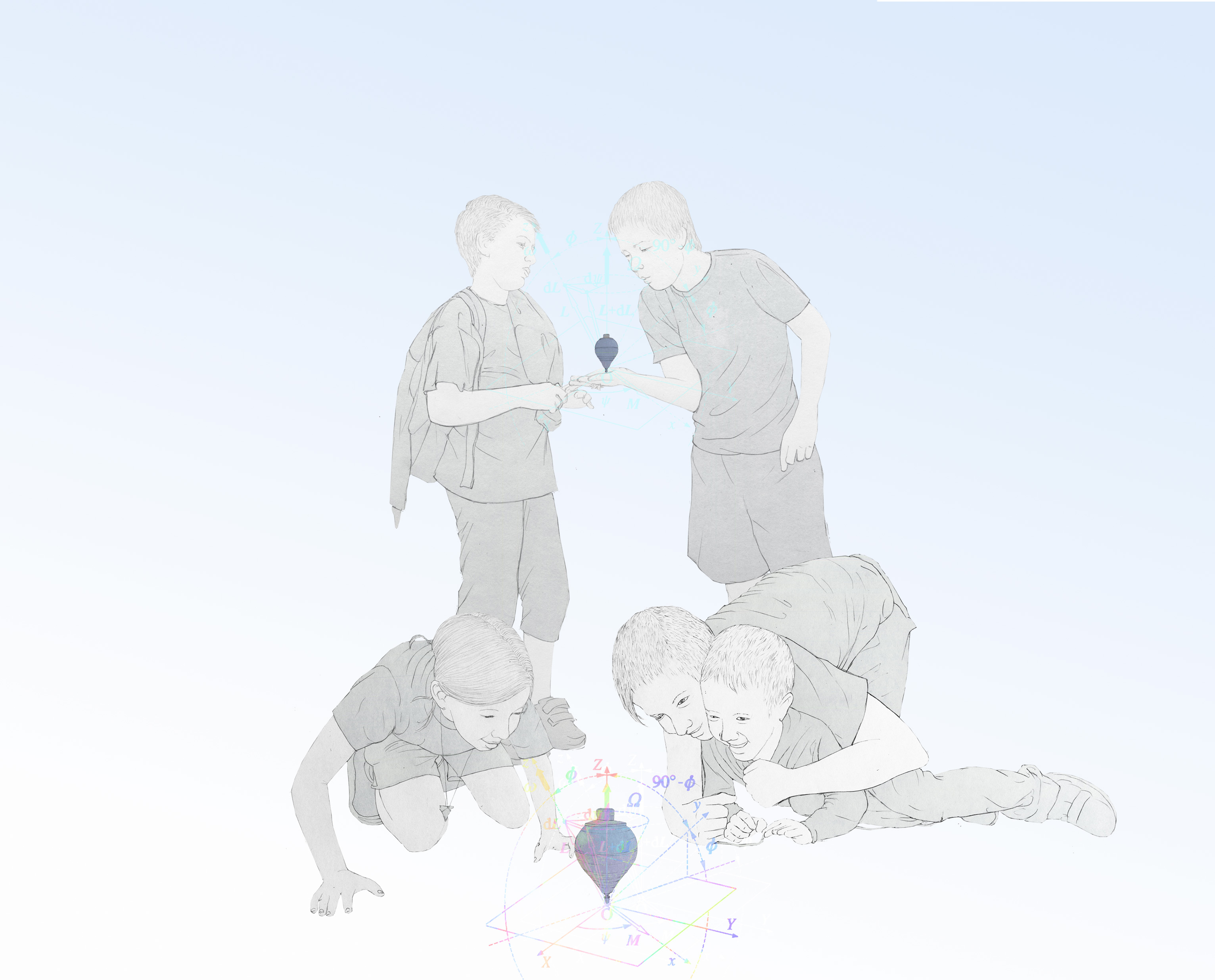 Xiquets jugant a la trompa. El joc a les societats rurals. La imatge busca il·lustrar el procés de joc, tant la creació de regles com la cerca de materials per a crear joguets. Cada imatge il·lustra diferents activitats que a dia de hui serien considerades perilloses o inapropiades. Autor de la il·lustració: Andrés Marín Jarque.